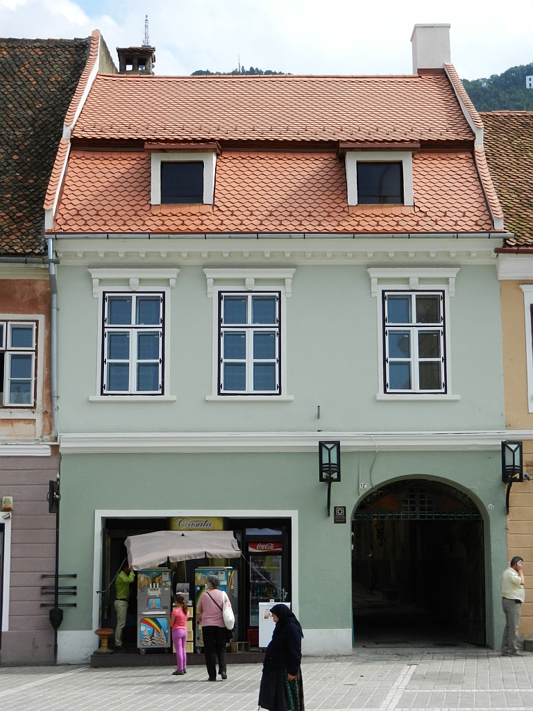 Casă Piata Sfatului 12